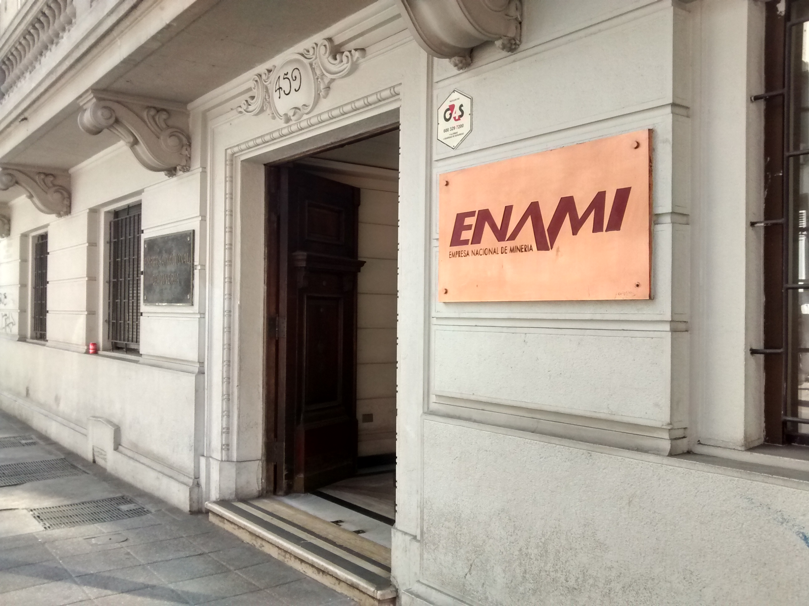 Edificio de ENAMI en Santiago de Chile.